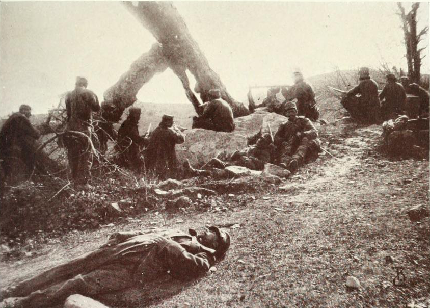 Tropas griegas en acción durante las Guerras Balcánicas.